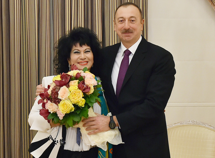 Zeynəb Xanlarova İlham Əliyev ilə